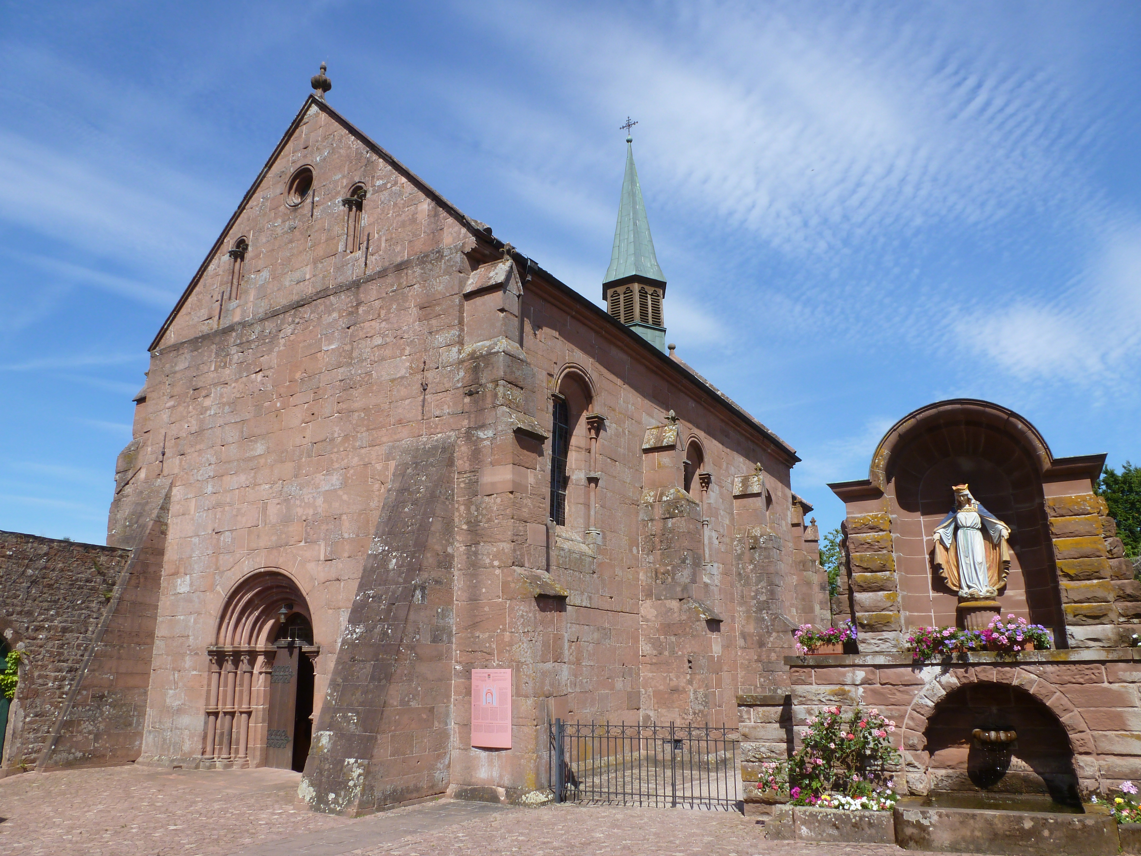 Chapelle Sainte Marie de l’Assomption, bâtie au XIIIème siècle, à Obersteigen (commune de Wangenbourg-Engenthal, Bas-Rhin, Alsace).